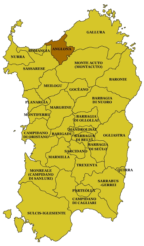 Sardinian Subregions